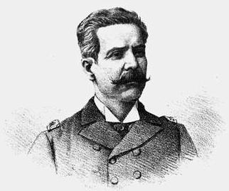 Contra-almirante Custodio José de Mello, Ministro da Marinha